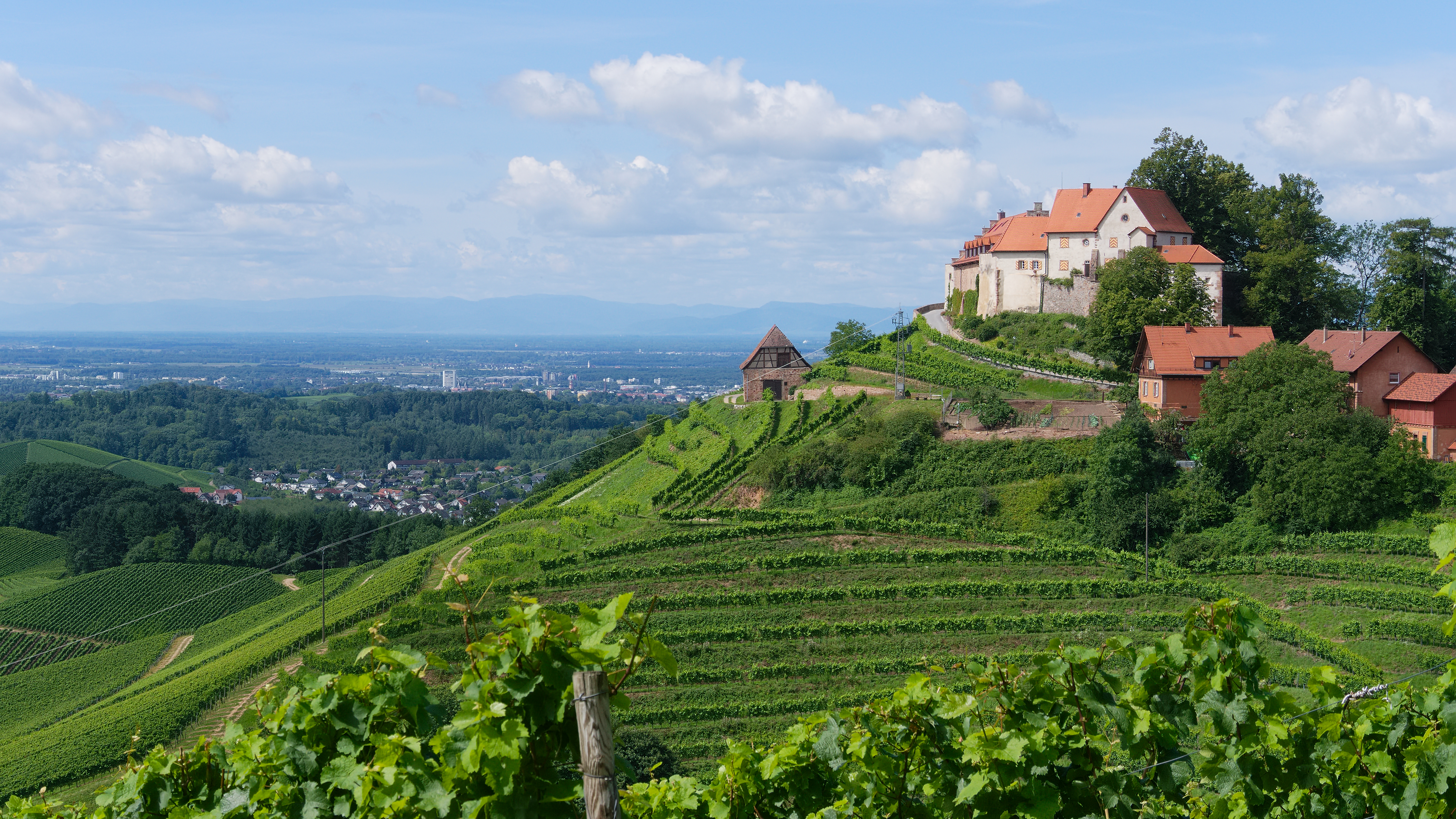 Weingut Schloss Staufenberg (Schwarzwald). Aufgenommen in Durbach, Baden-Württemberg, Deutschland.